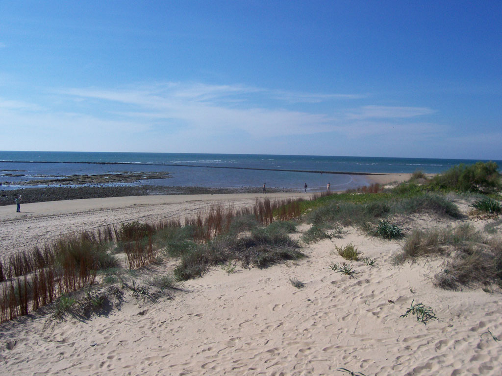 Playa de Punta Candor, Rota-Cádiz-Andalucía-España